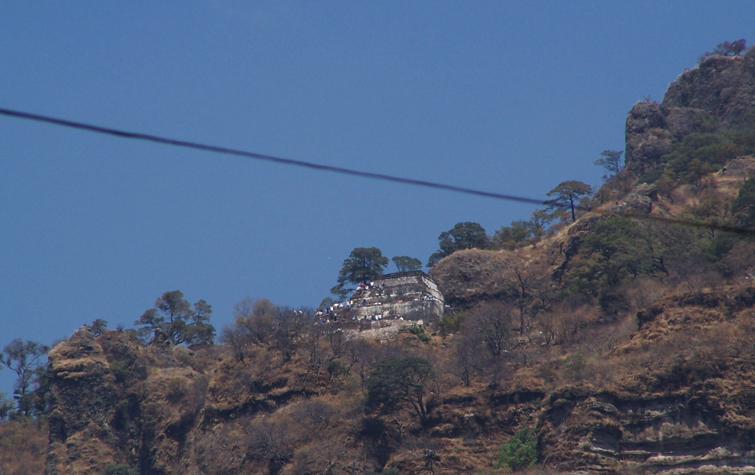 Piramide del Tepozteco construida sobre un peñon en el cerro del tepozteco, vista desde la av principal del poblado de tepoztlan